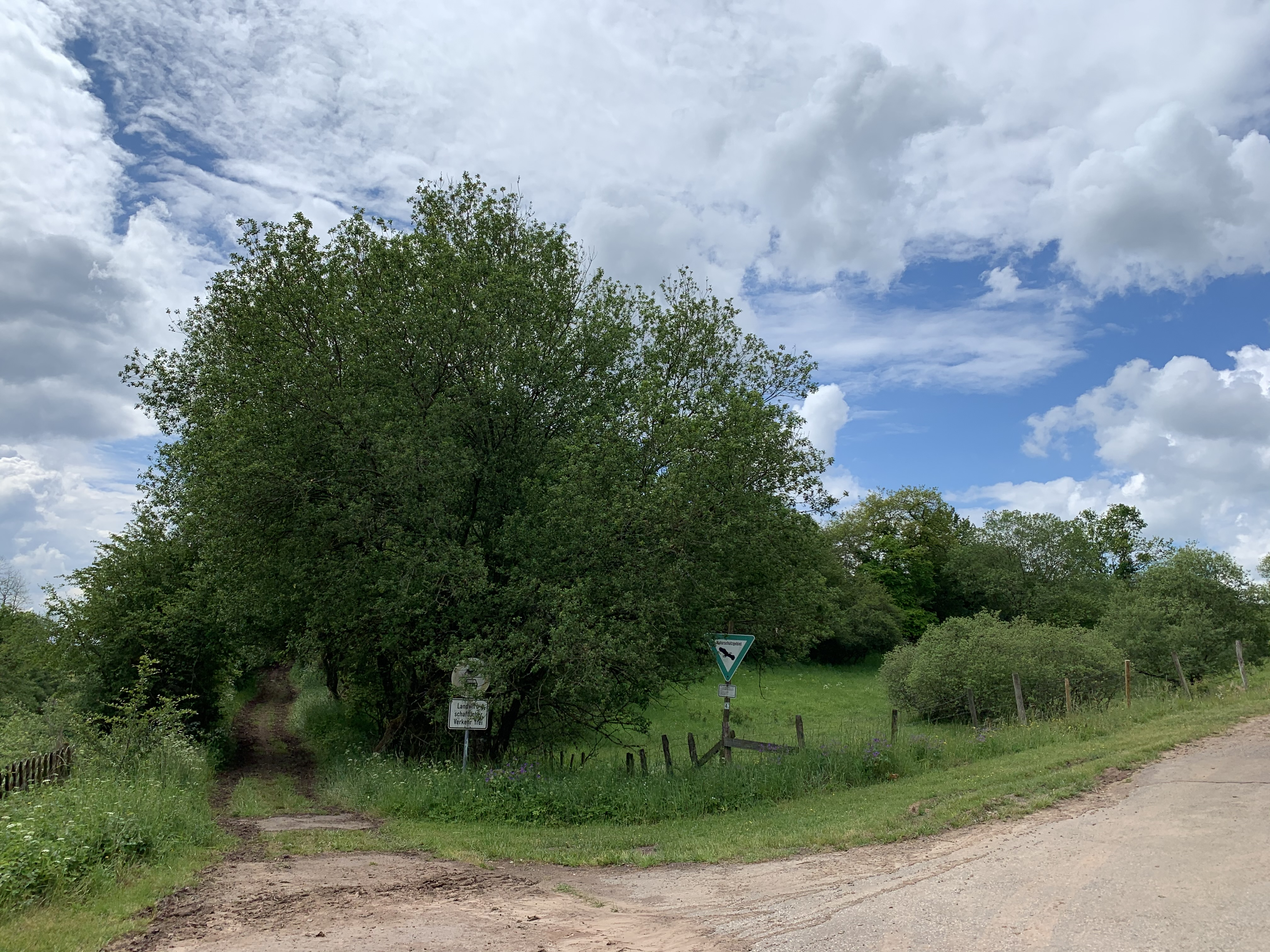 Das Naturschutzgebiet Glaadtbachtal mit Nebenbächen ist ein 72,4 Hektar großes NSG in Dahlem, Kreis Euskirchen in NRW